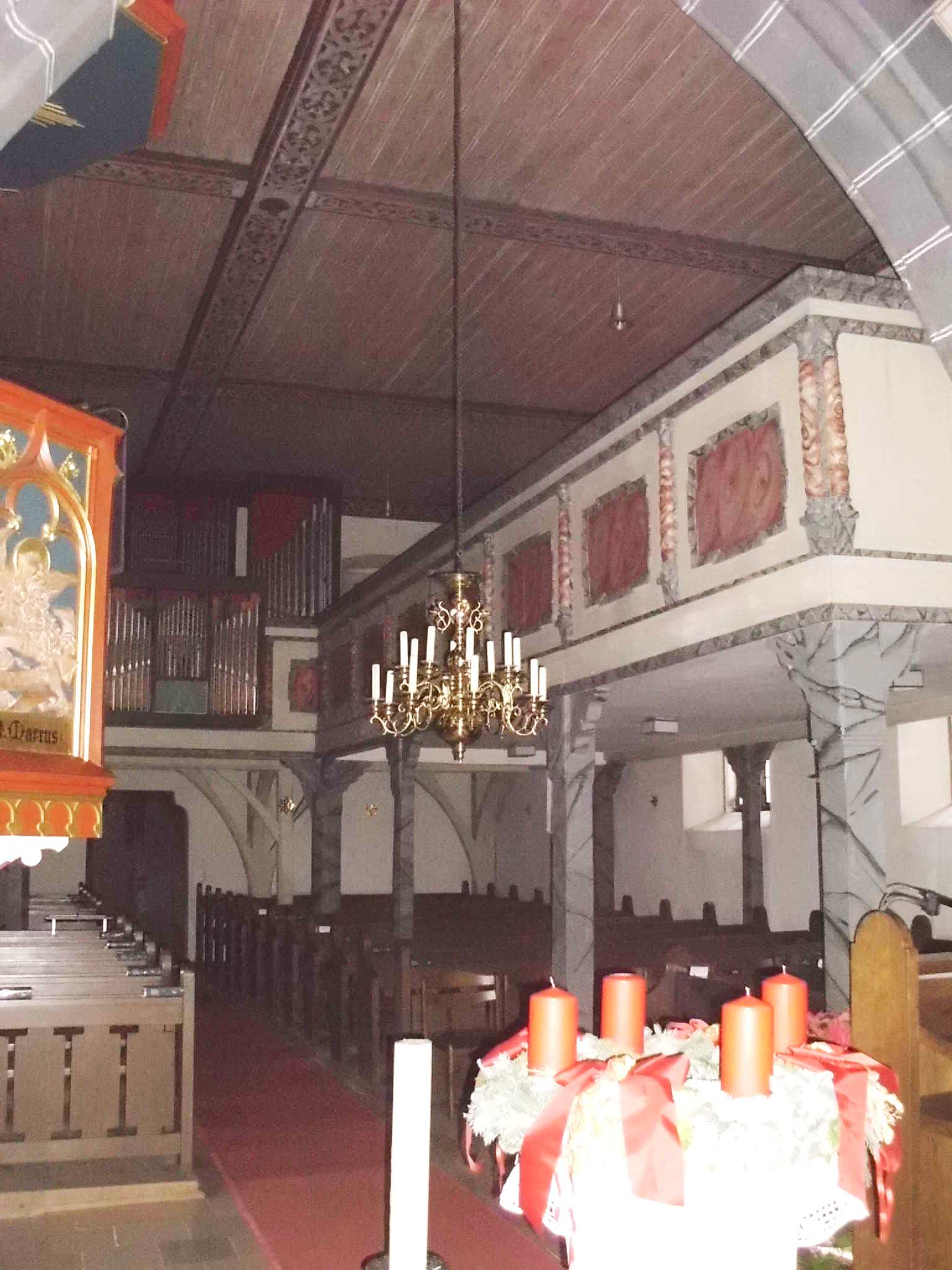 Evang. Kirche St. Jodokus in Gunzenhausen-Unterwurmbach, Landkreis Weißenburg-Gunzenhausen (Bayern), Inneres, Blick aus dem Chor gegen Westen